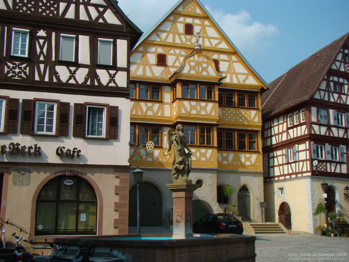 Rathaus von Neudenau (mittleres Gebäude)